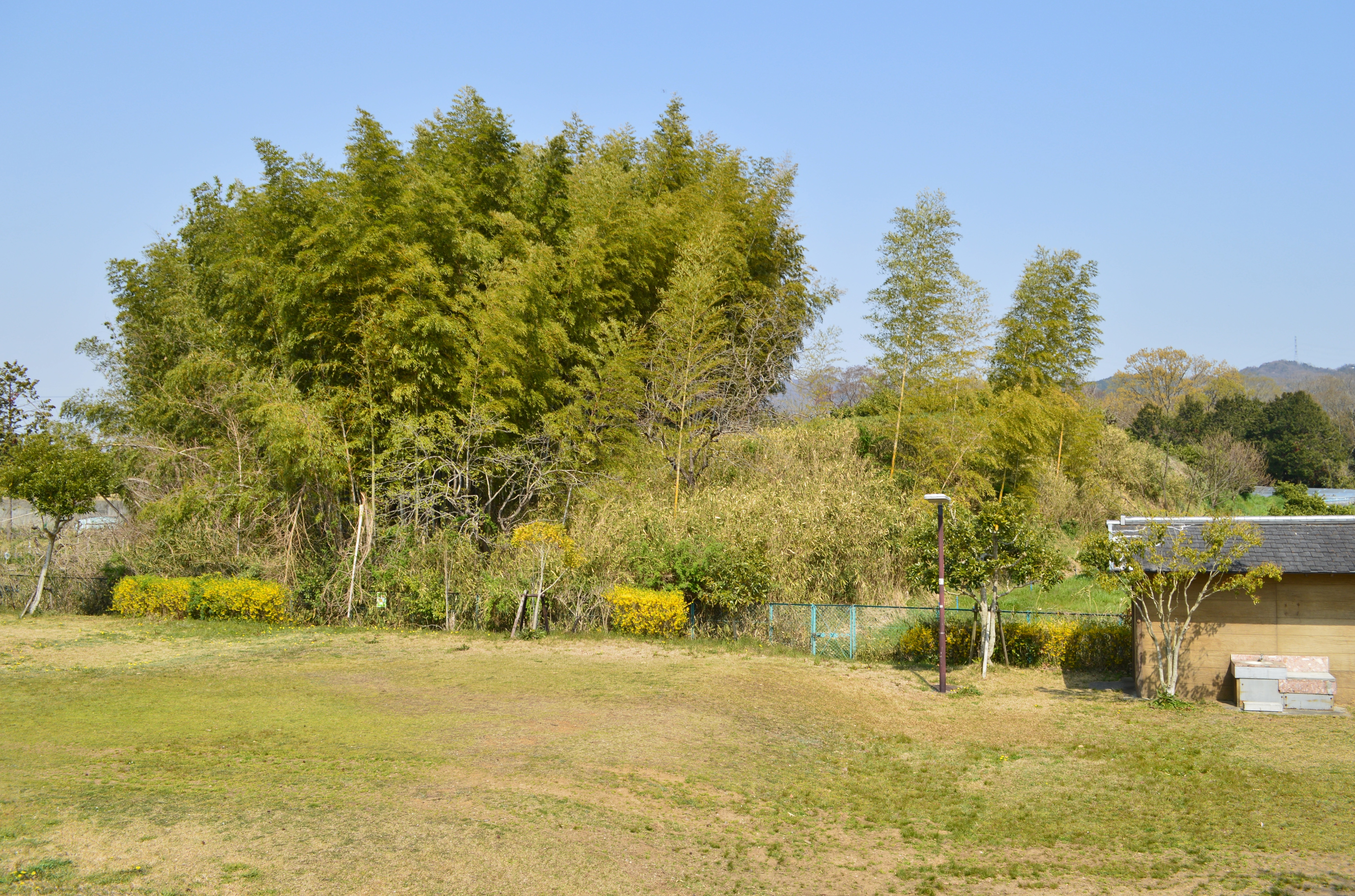 葉室塚古墳 墳丘全景 Nikon D3200